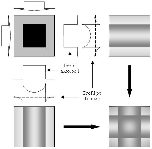 Przykład metody sumacyjnej z filtracją, jednej z metod analitycznych.